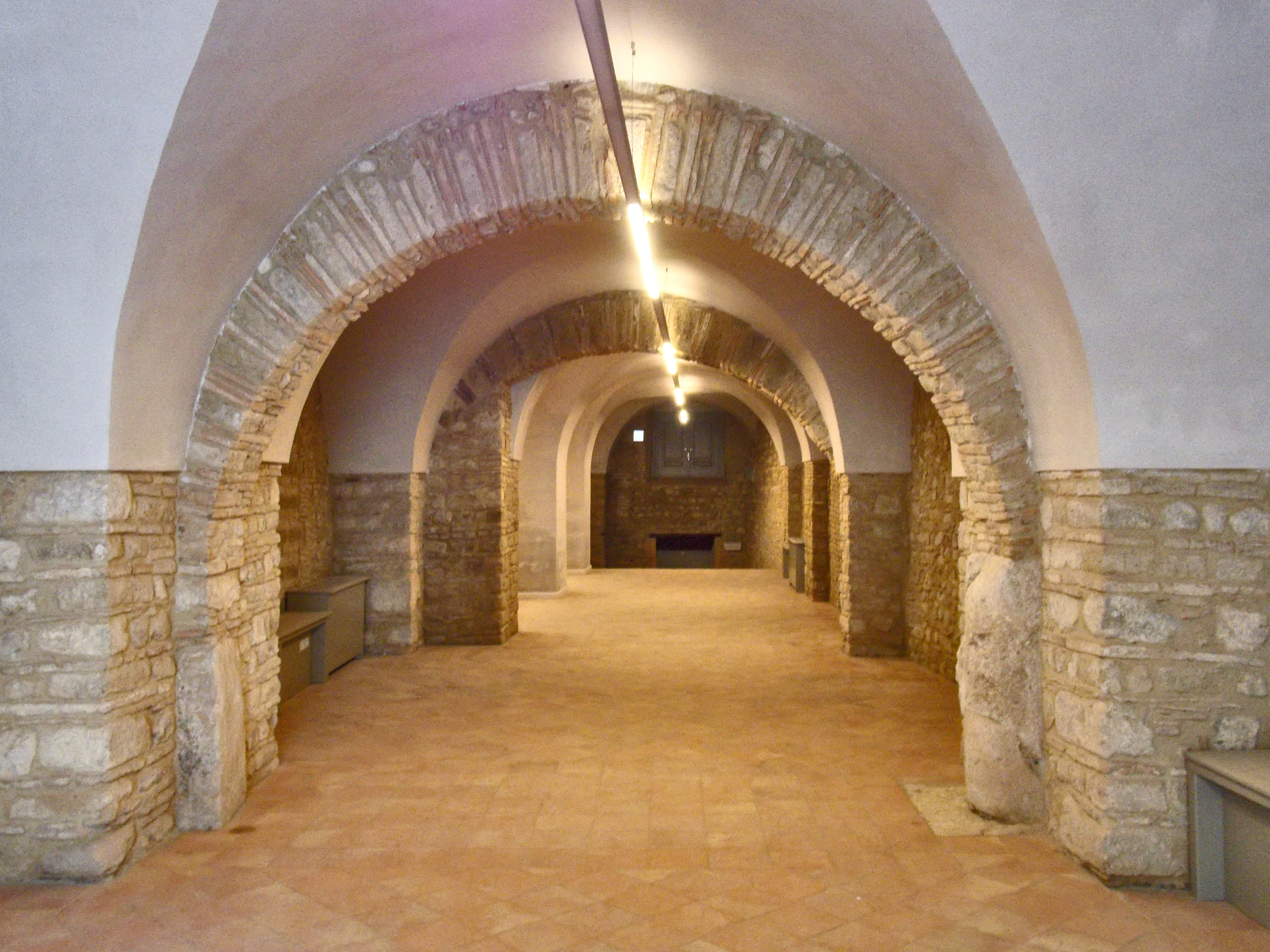 L'ex monastero benedettino di San Vittorino a Benevento. La zona recuperata per il Conservatorio Statale di Musica Nicola Sala